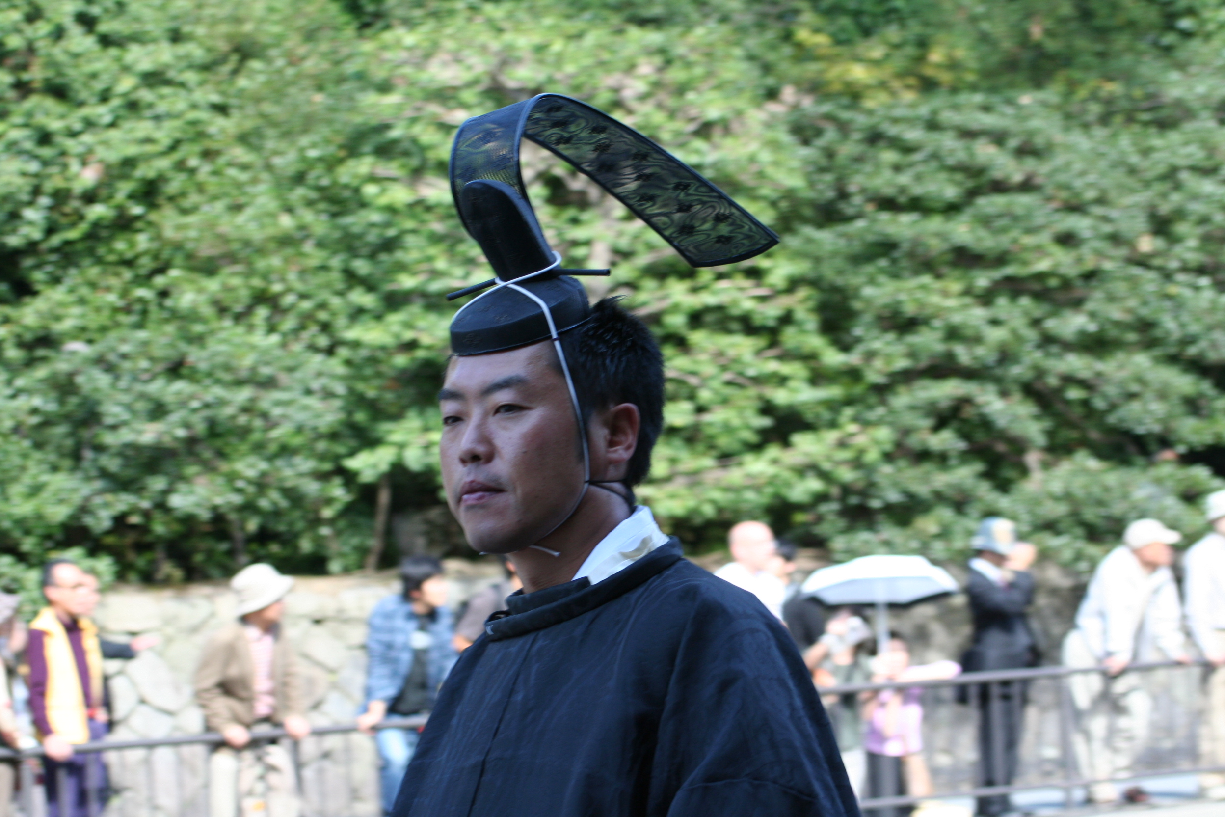 京都府京都市にて開催された時代祭。正午の御所から平安神宮までの行進の様子。2009年10月22日撮影。